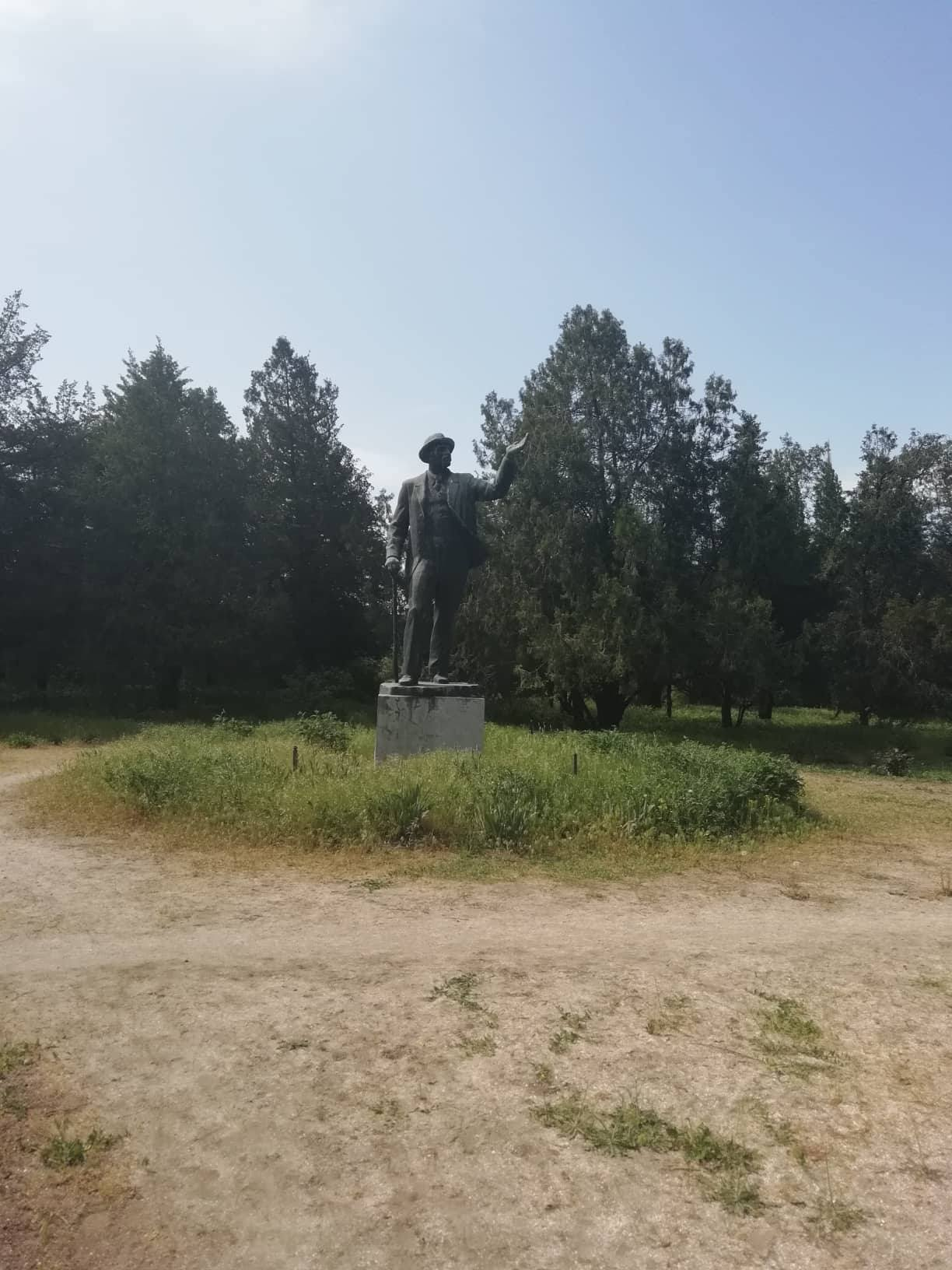 Мелитопольская опытная станция садоводства имени М. Ф. Сидоренко